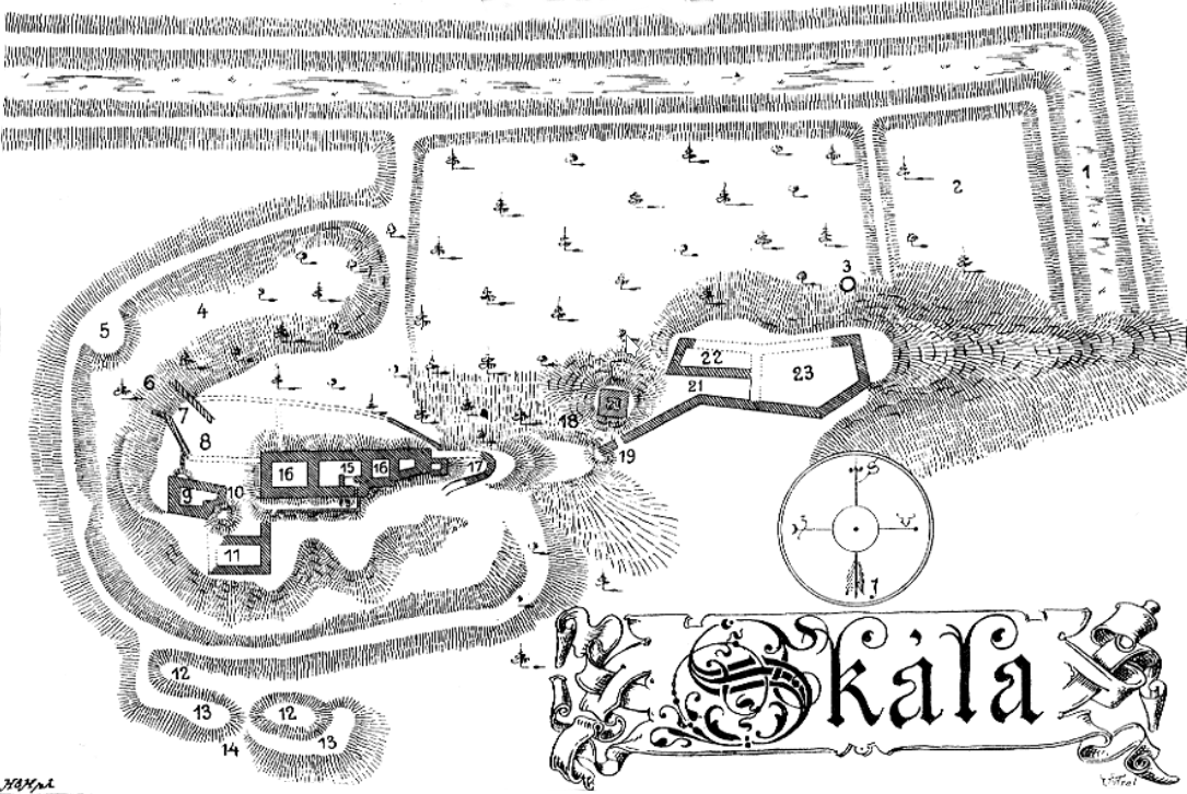 Skála – půdorys hradu od Vojtěcha Krále z Dobré Vody publikovaný roku 1893; popis: 1 – příkop, 2 – předhradí, 3 – cisterna, 4 – příkop, 5 – násep k mostu, 6 – místo padacího mostu, 7 – brána, 8 – dvůr, 9 – věž, 10 – branka mezi skalami, 11 – zadní brána, 12 – příkopy, 13 – val, 14 – průchod ve valu, 15 – schodiště s druhou bránou, 16 – palác, 17 – bašta s hradbou, 18 – vchod do dolního hradu, 19 – branka, 20 – věž, 21 – horní část obydlí, 22 – dolní část obydlí, 23 – dvůr